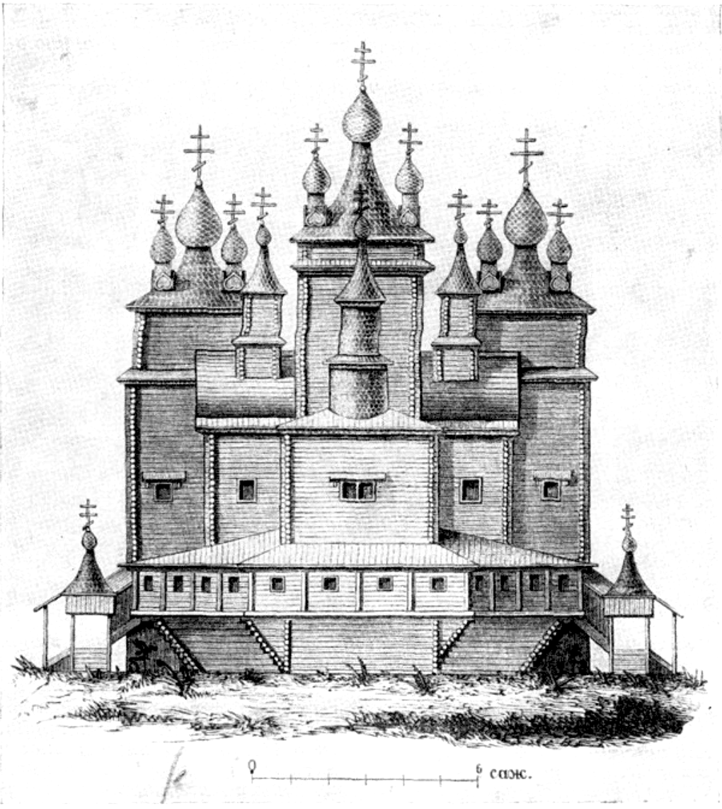 Западный фасад Воскресенского собора.